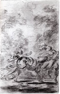 Illustration du Roland furieux par Jean-Honoré Fragonard, dessin à la pierre noire